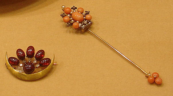 jewelry, tiepin